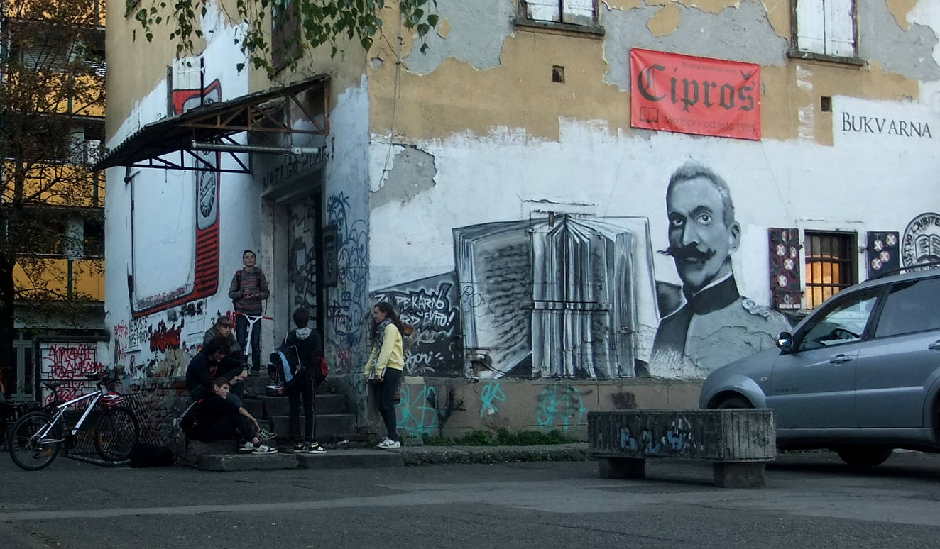 Kulturzentrum Pekarna in Maribor, Detailansicht: Eingang zur Bibliothek Ciproš